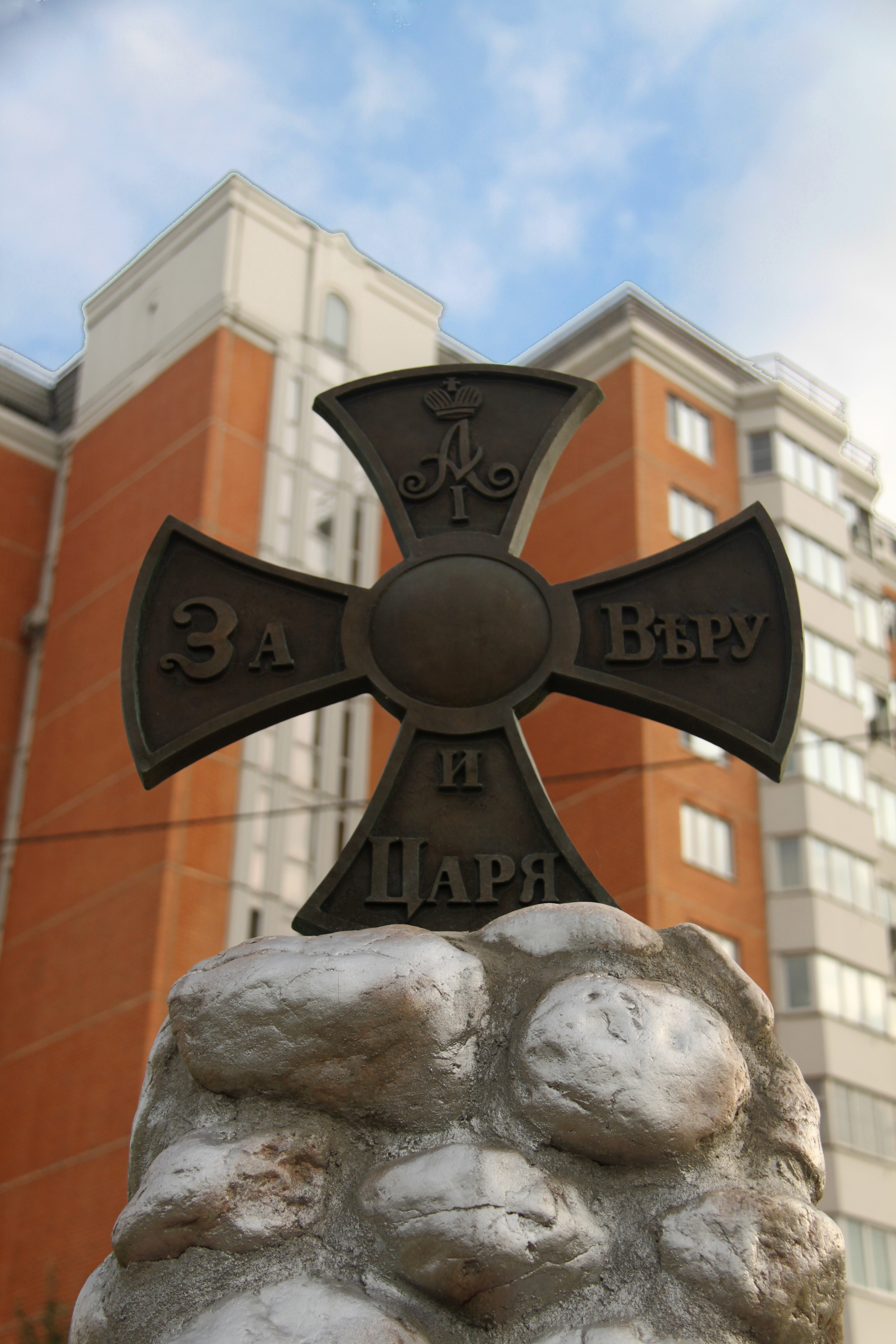 Ополченский крест на памятнике в честь 200-летия победы в Отечественной войне 1812 года